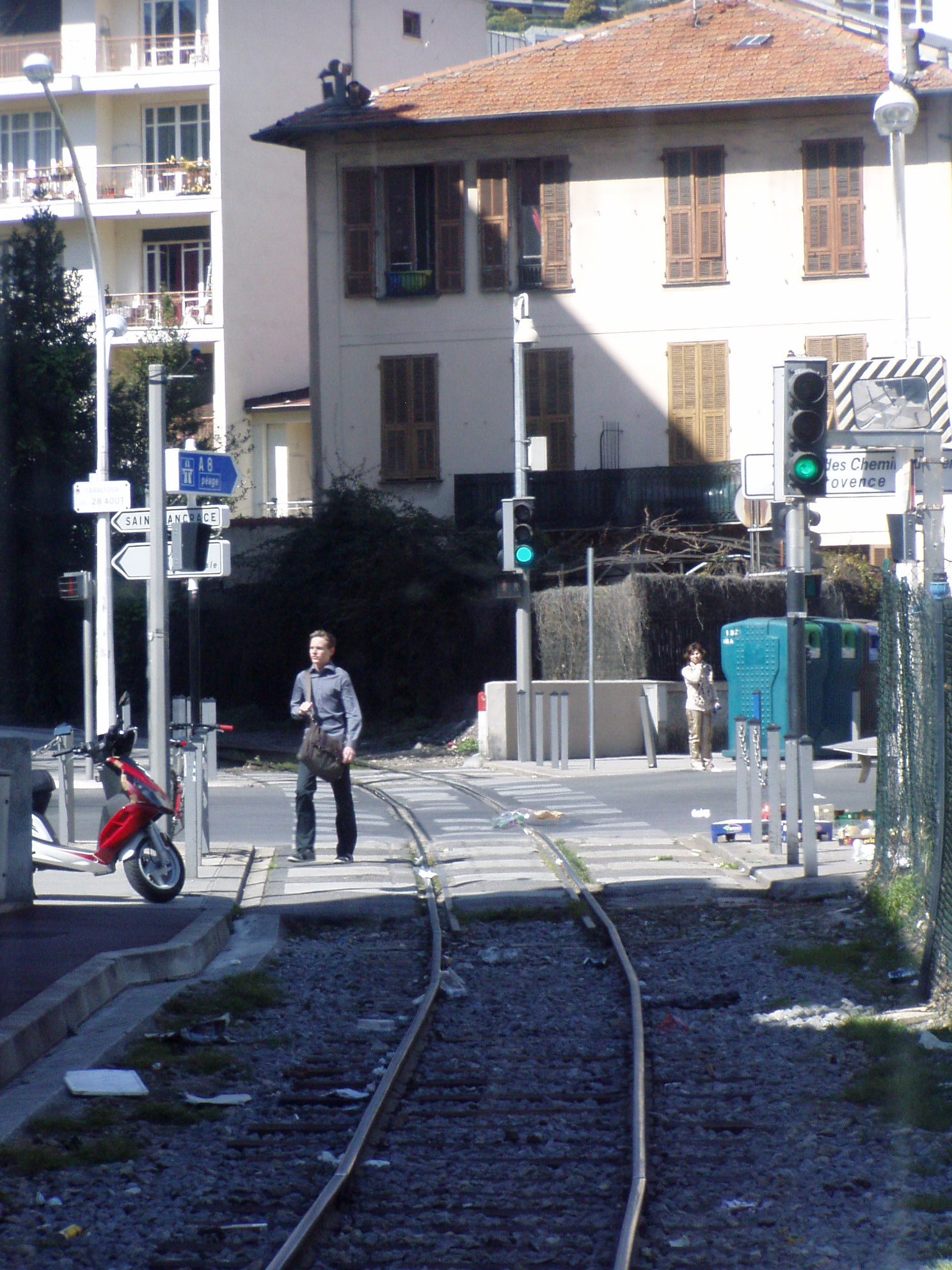 Chemins de Fer de Provence en Nice